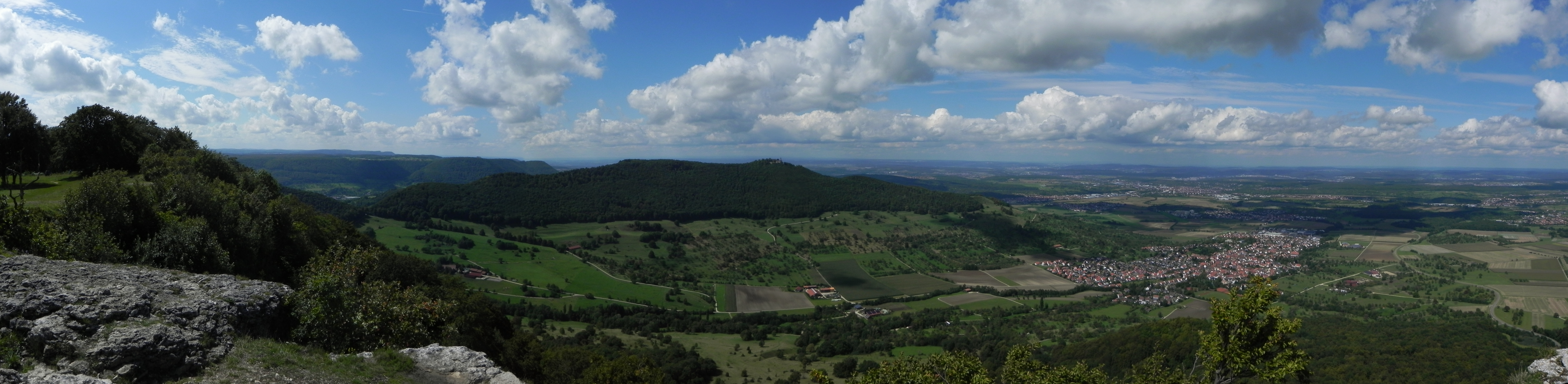 Panoramablick vom Breitenstein (Schwäbische Alb) vom Südwesten bis Nordwesten. In der Mitte die Burg Teck.